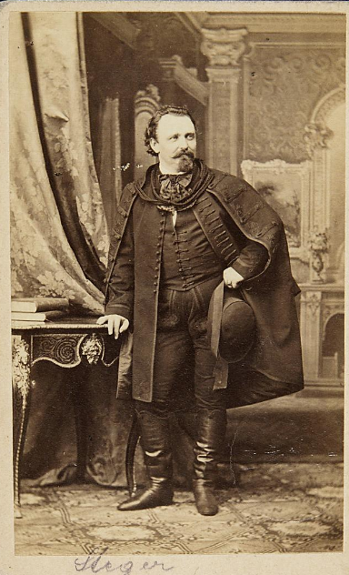 Ludwig Angerer Emil Steger Hinweis zum Fotografen und zum Datum: Ludwig Angerer starb 1879, Emil Steger war da grad 21 Jahre alt. Auf dem Foto sieht er nicht wie ein 21-Jähriger aus, daher ist das Foto im Atelier Ludwig Angerer von einem Nachfolger oder dessen Angestellten gemacht worden.